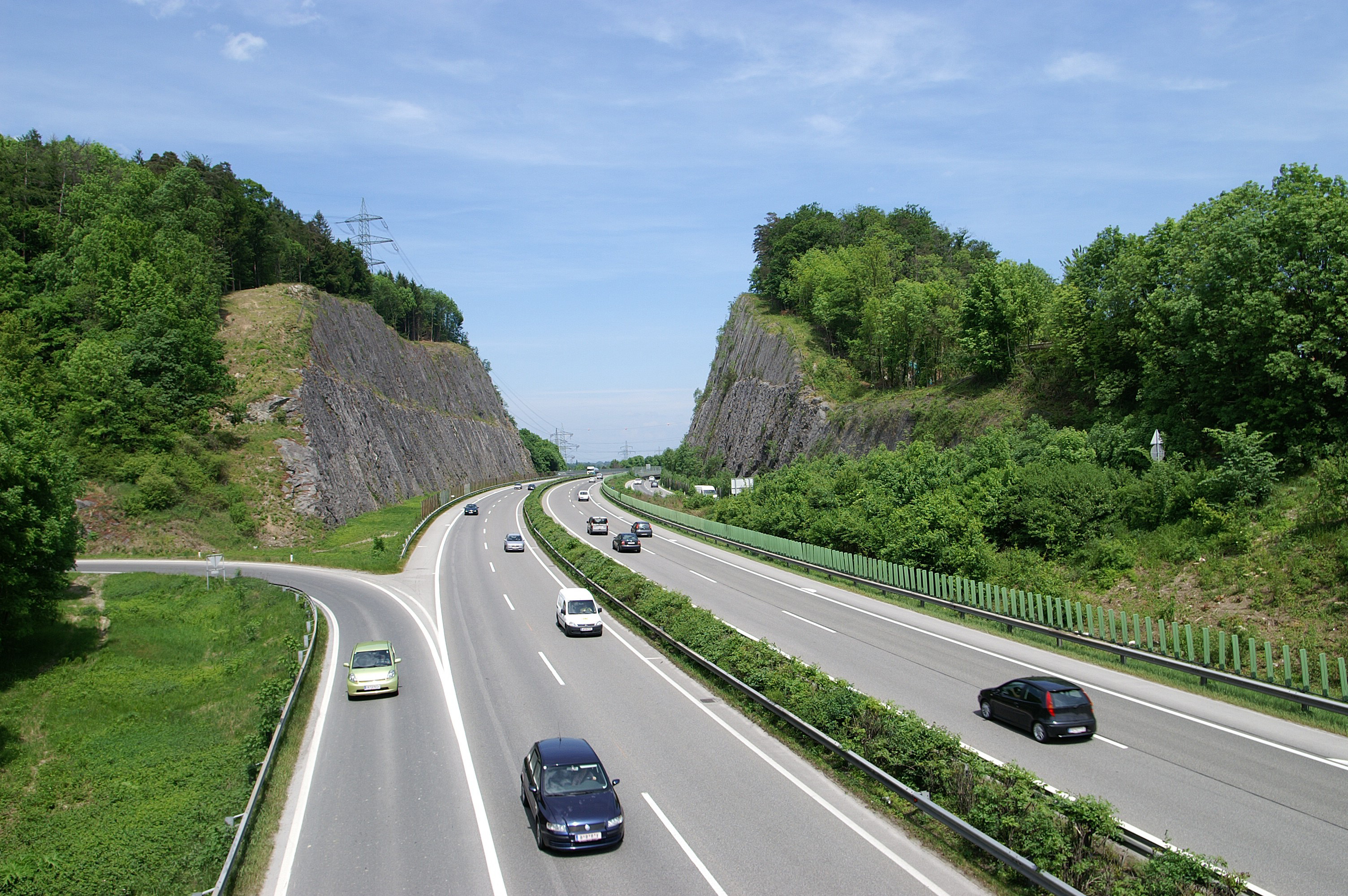 Durchgang Udelberg neben dem Kummenberg - Rheintal/Walgau Autobahn, A14. Auffahrt von Koblach und Götzis in Fahrtrichtung Feldkirch in Vorarlberg.